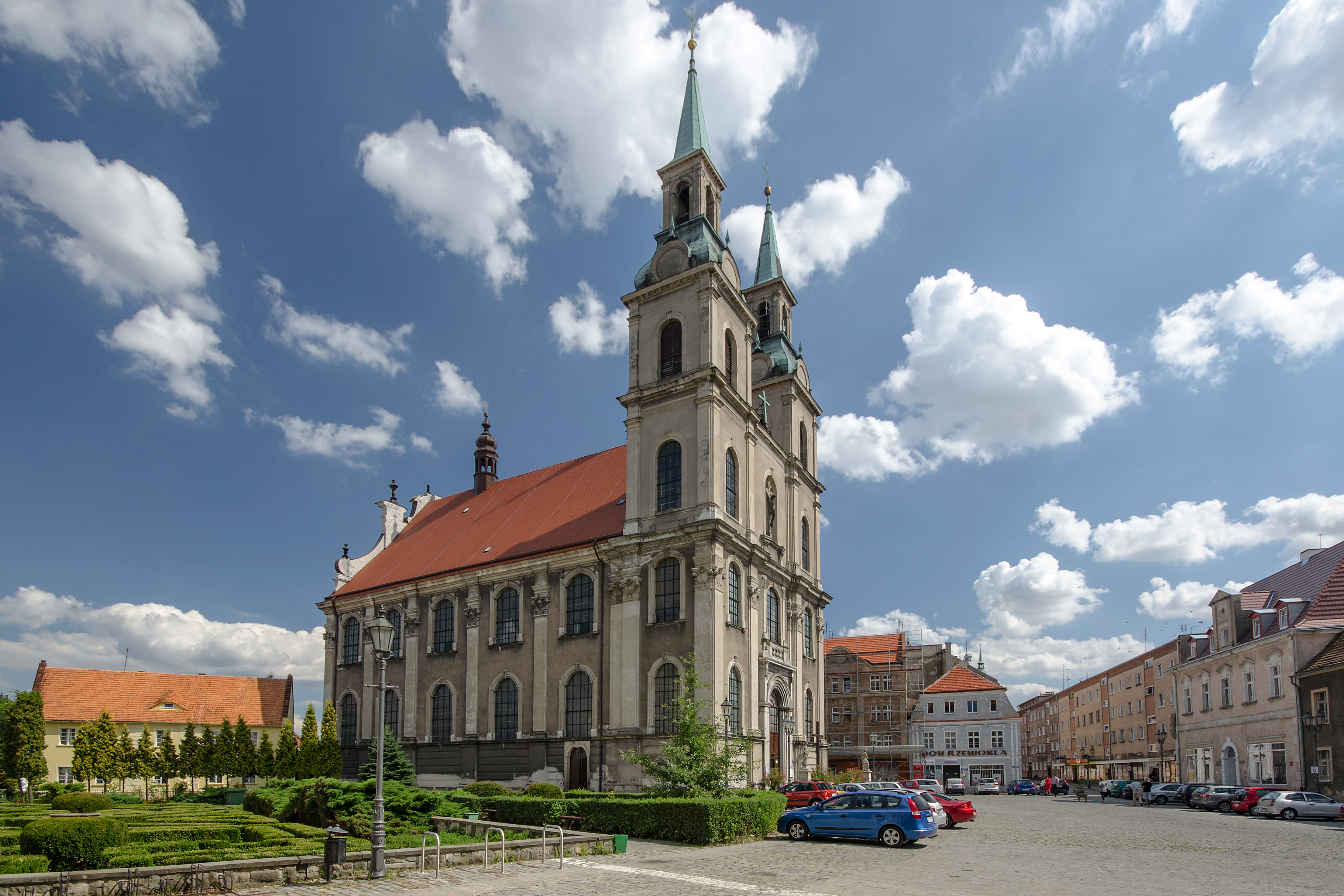 Brzeg, kościół klasztorny jezuitów, ob. par. p.w. Św. Krzyża, 1734, 1856